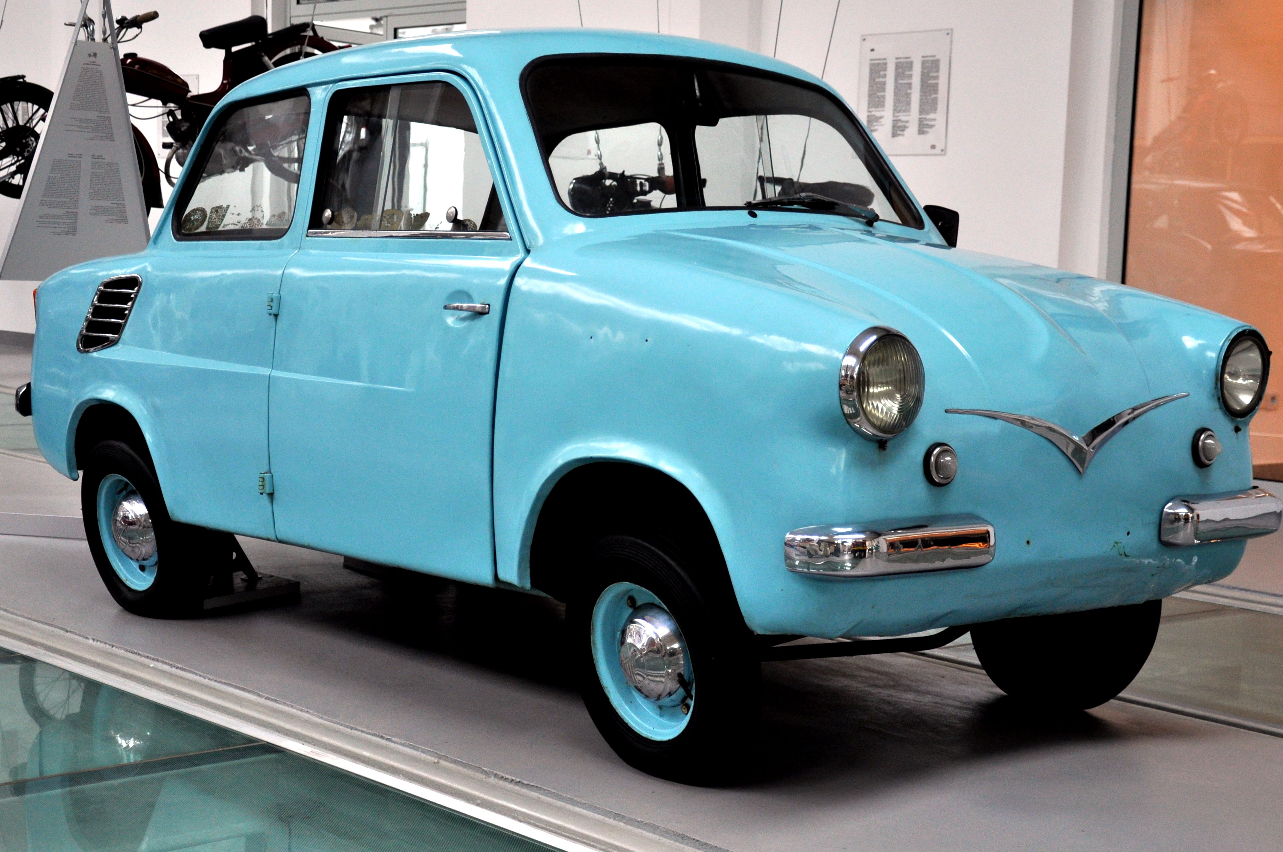 Muzeum Techniki i Komunikacji - Zajezdnia Sztuki w Szczecinie